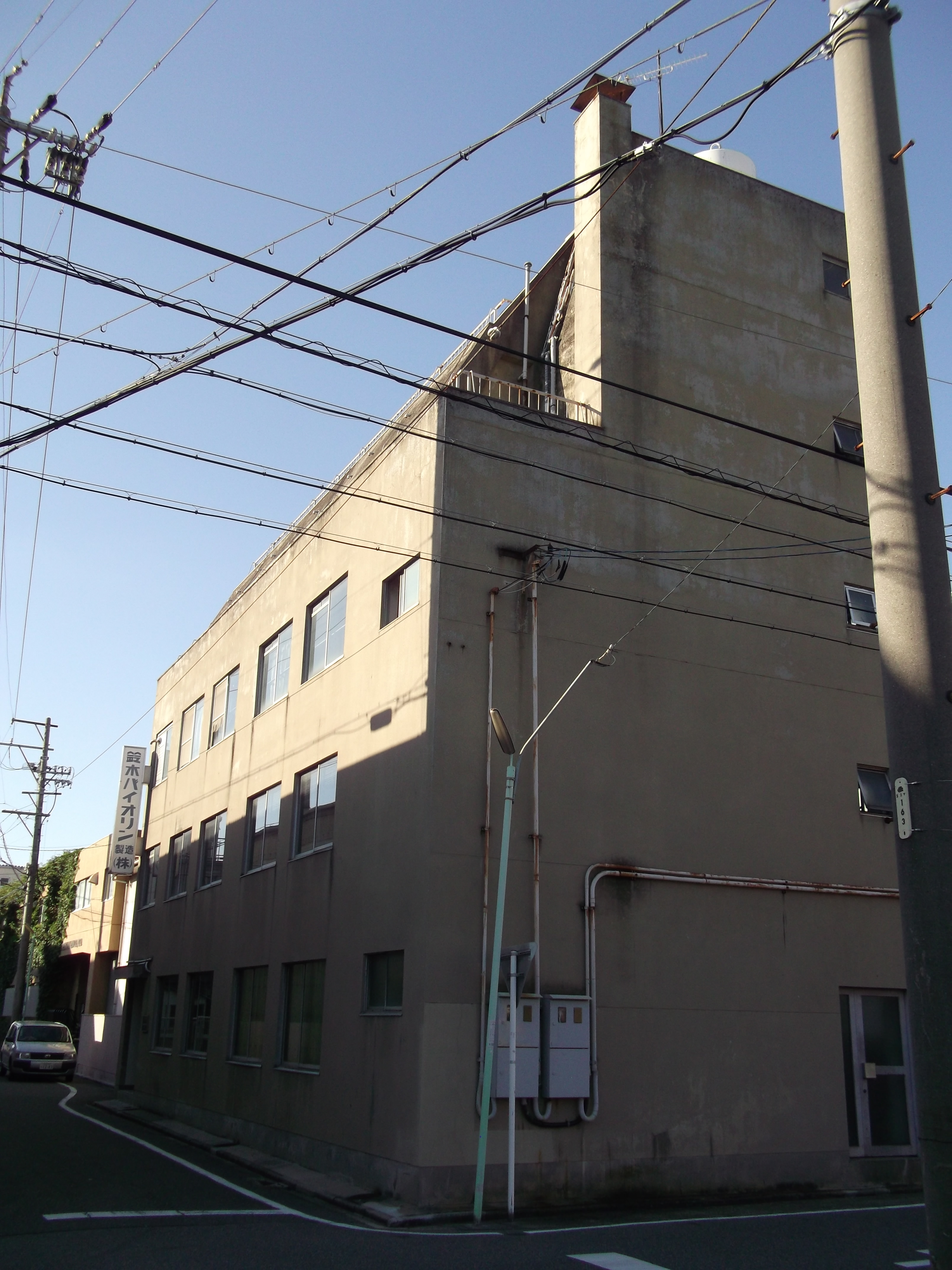 名古屋市中川区広川町の鈴木バイオリン製造本社を南側公道東側より撮影